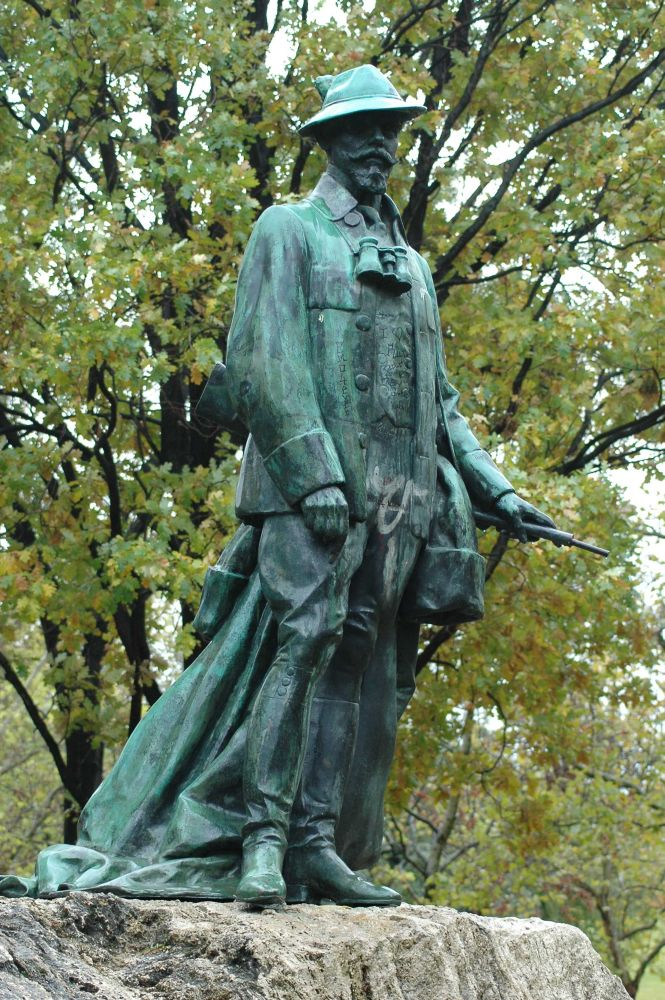 Habsburg–Lotaringiai Rudolf főherceg osztrák-magyar trónörökös szobra Budapest XIV. kerületében. Ligeti Miklós alkotása, 1908-ban avatták fel. Eredetileg a Stefánia úton volt látható, 1995-ben került mai helyére, az Olof Palme-ház hátsó homlokzata előtti parkrészbe